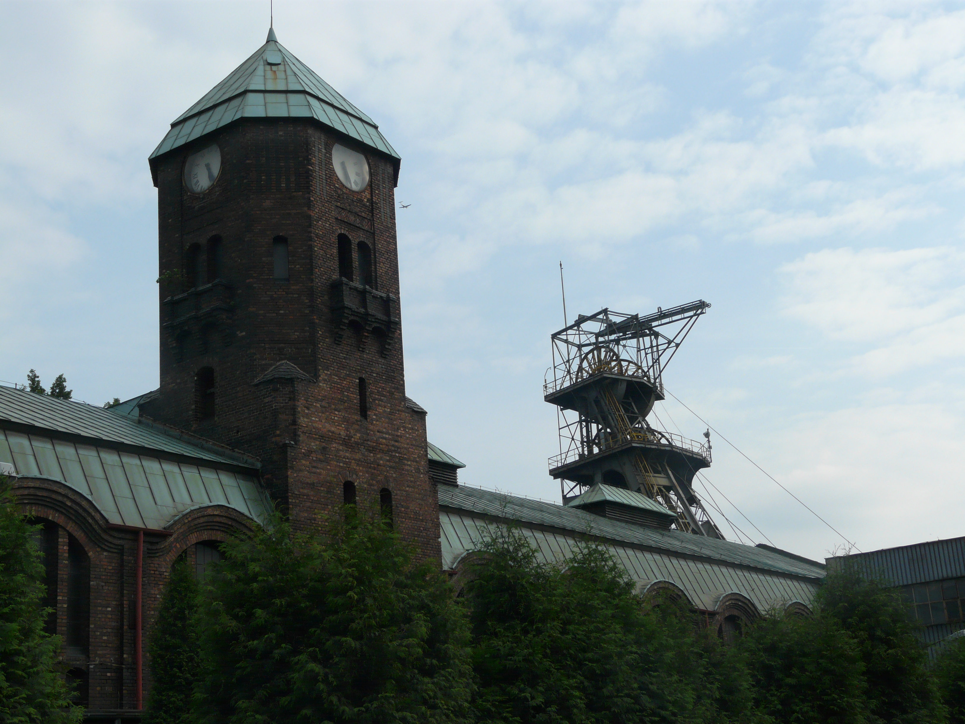 Wieczorek Coal Mine